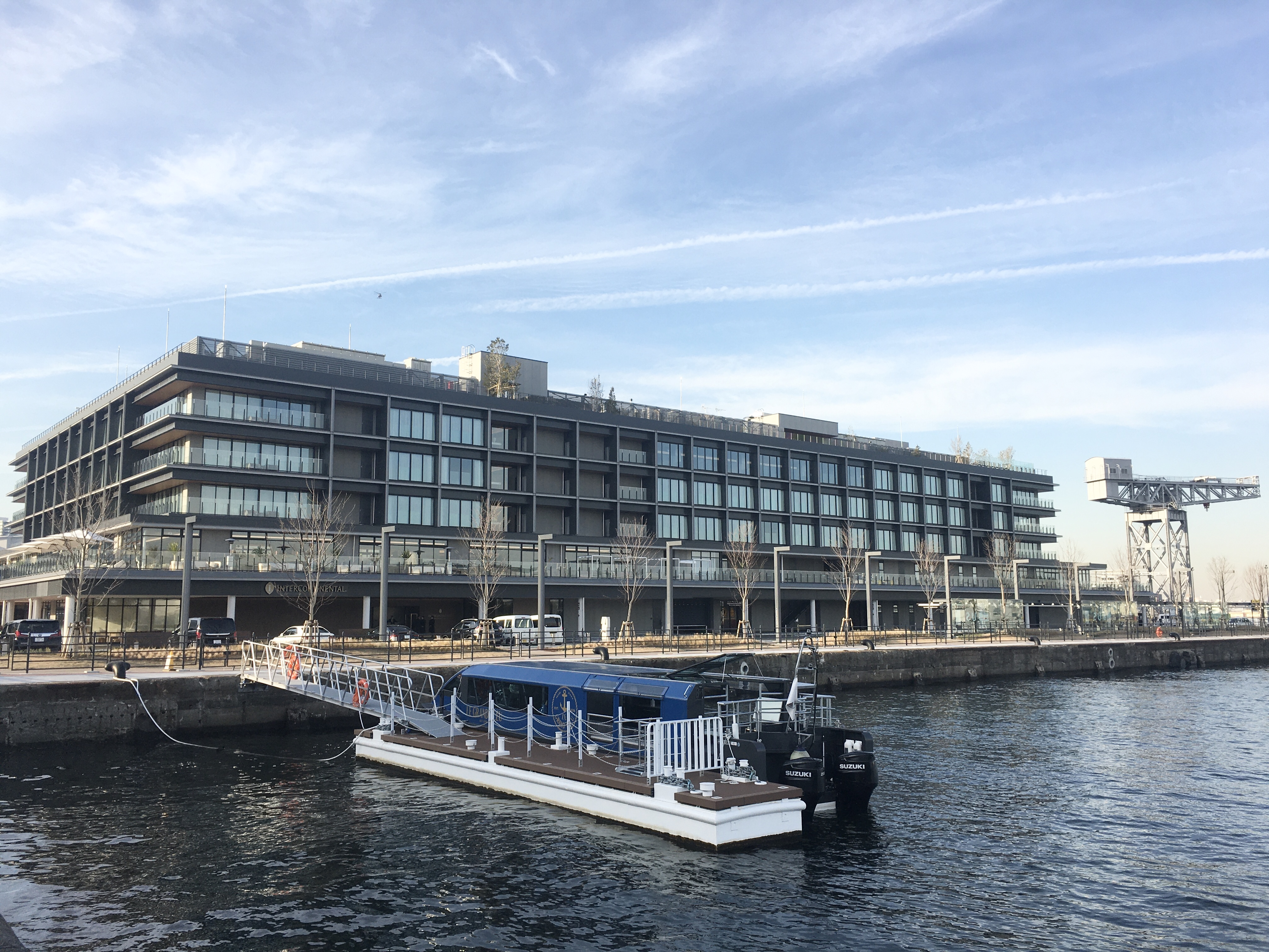 横浜市中区新港にある客船ターミナル複合施設「横浜ハンマーヘッド」の外観。